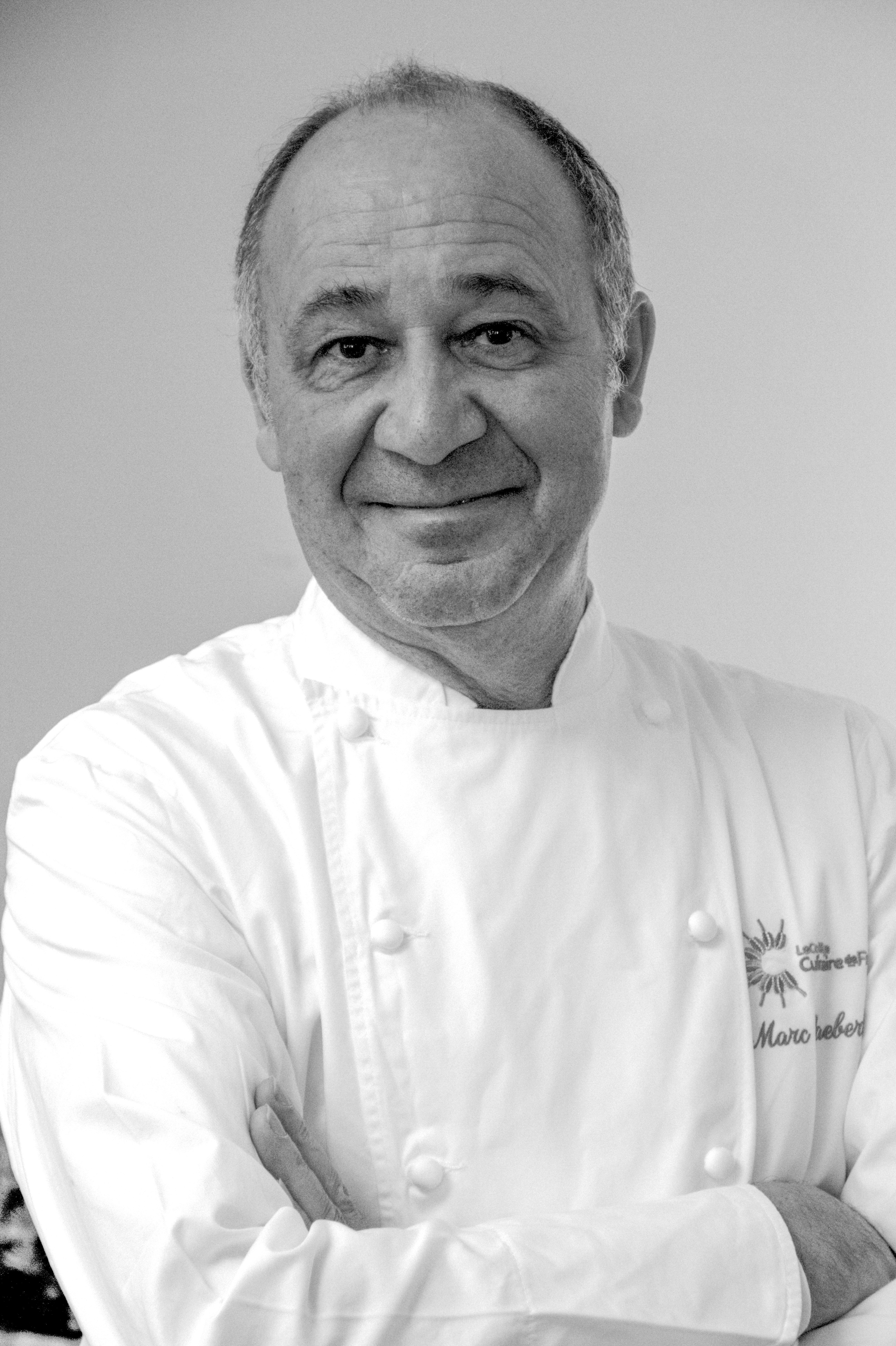 Marc Haeberlin par Claude Truong-Ngoc